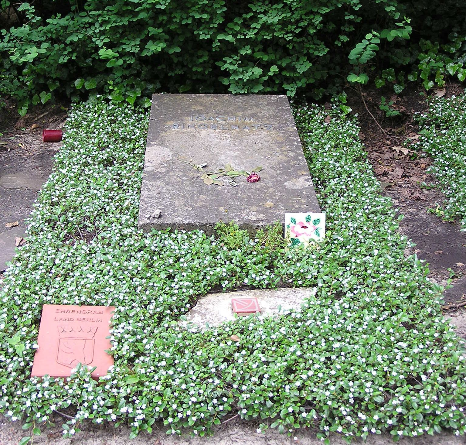 Grab von Joachim Ringelnatz auf dem Friedhof Heerstraße, Trakehner Allee 1, Berlin-Westend.